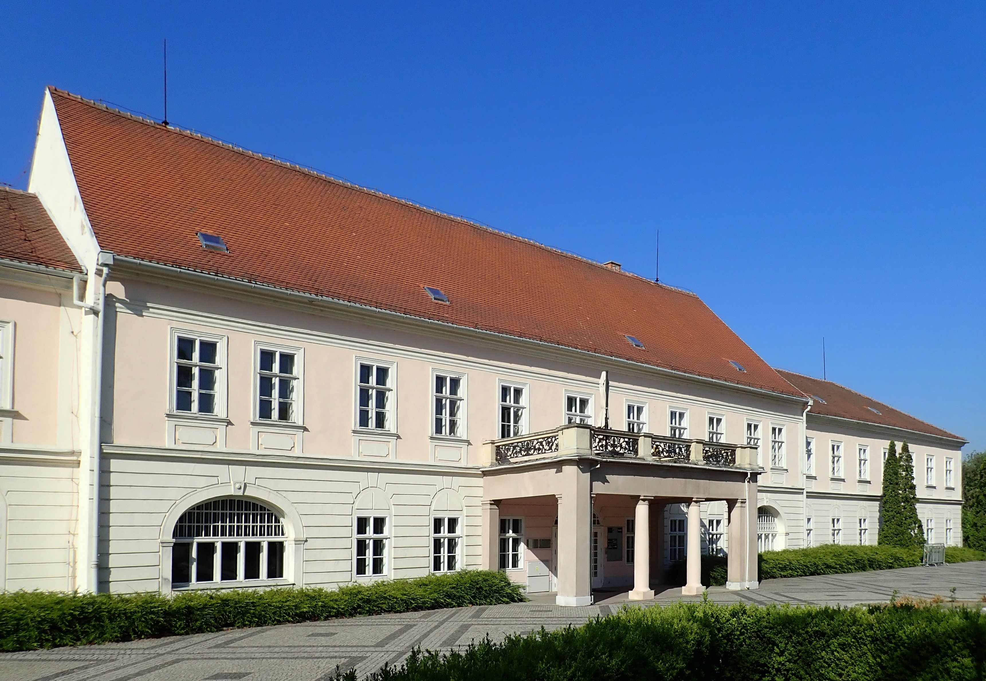 Bauerův zámeček